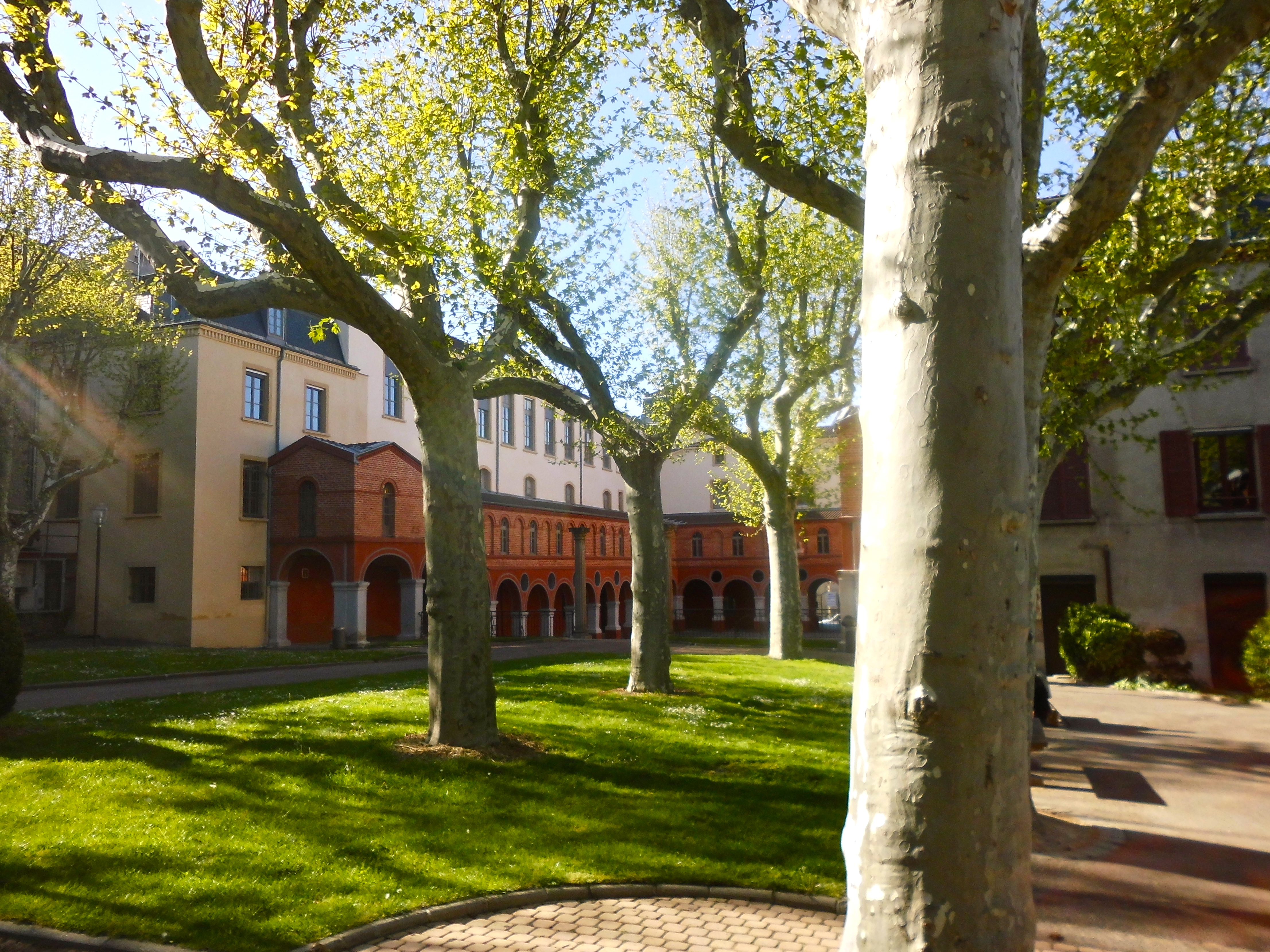 Saint-Chamond (Loire), jardin public, 15 avril 2014.